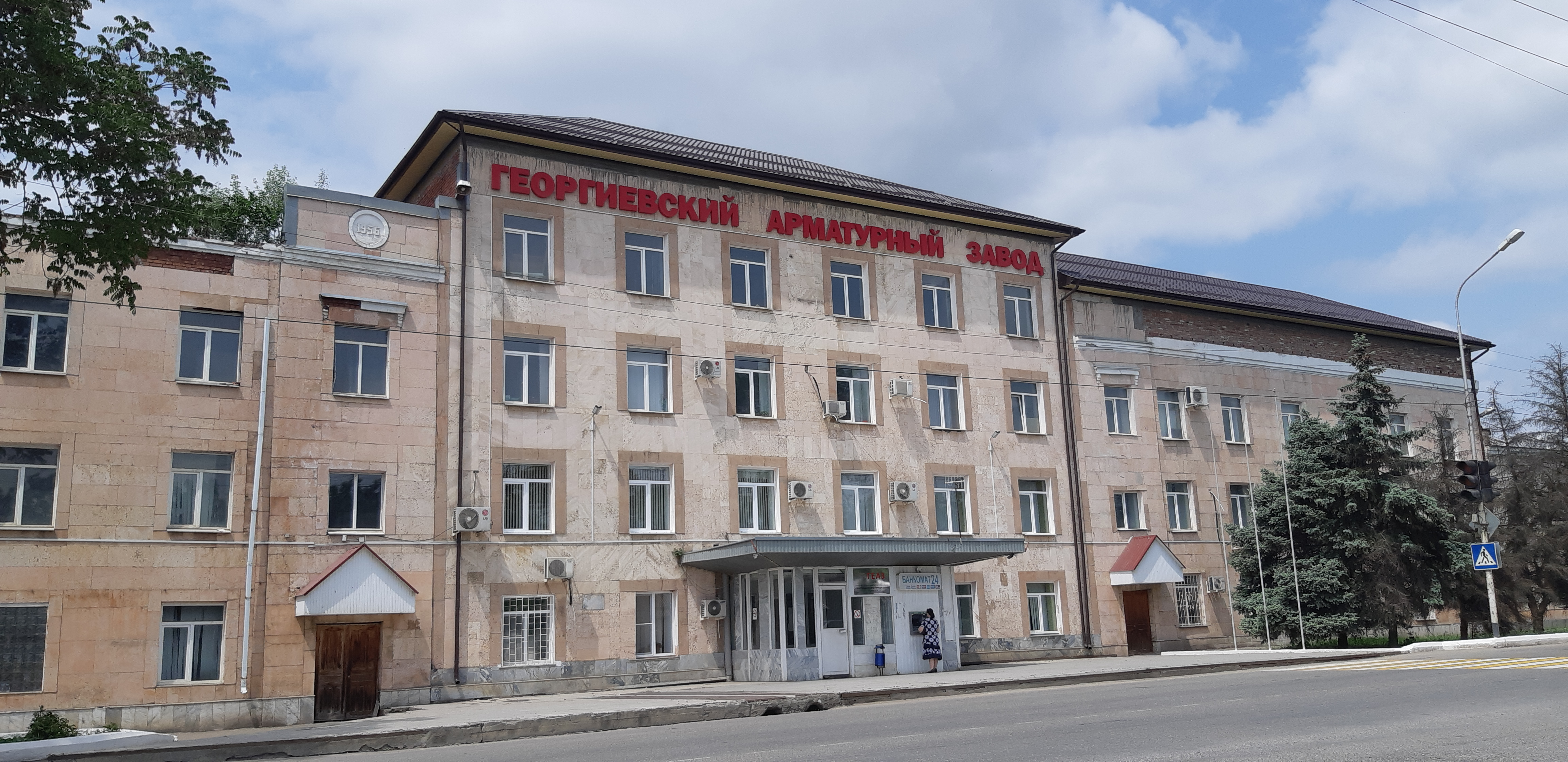 Арматурный завод Георгиевска . 1907 год.